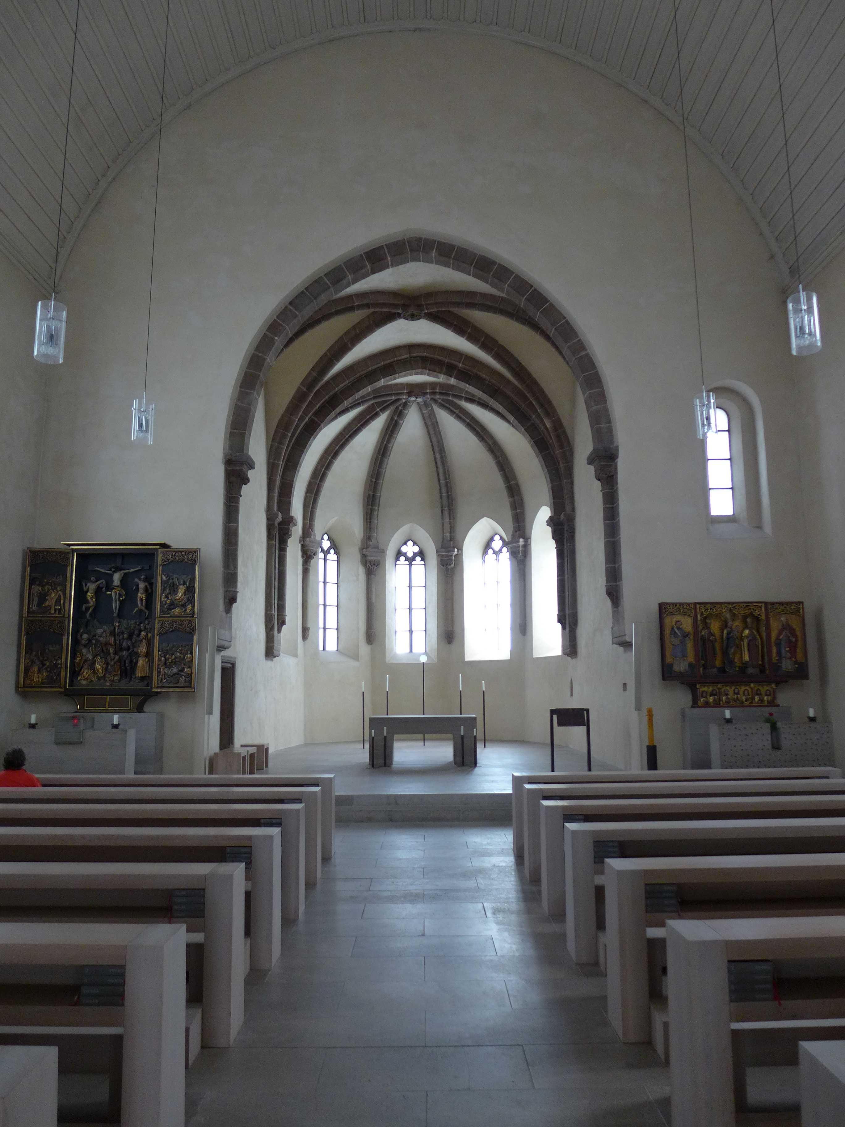 Inneres der Nürnberger Klarakirche mit Blick zur Apsis